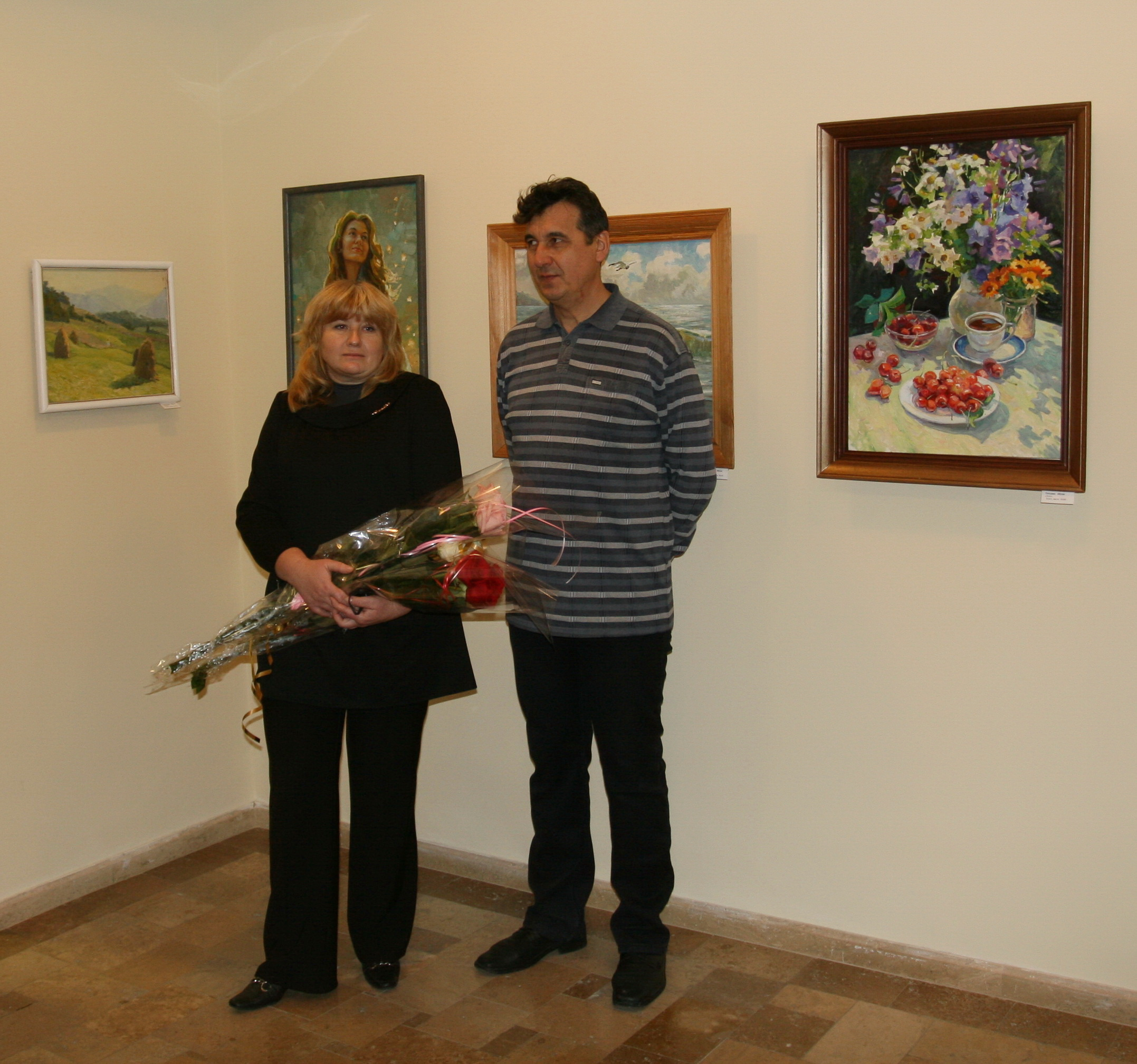 Супруги Владимир и Татьяна Шумы на открытии выставки «Окно»